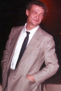 Philippe Léotard, comédien, chanteur et écrivain français.